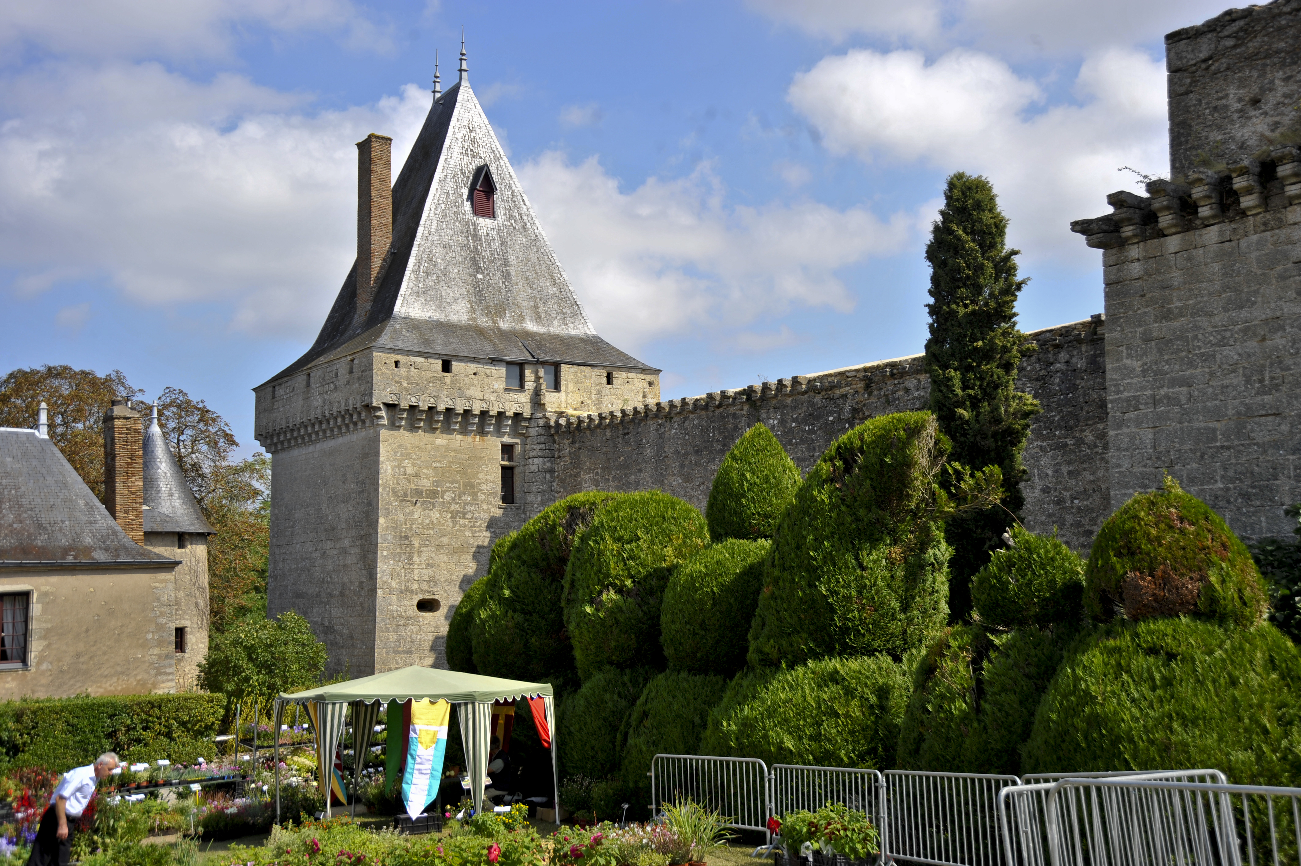 Fête du patrimoine au château d'Aubigné (Aubigné-sur-Layon, Maine-et-Loire, France).